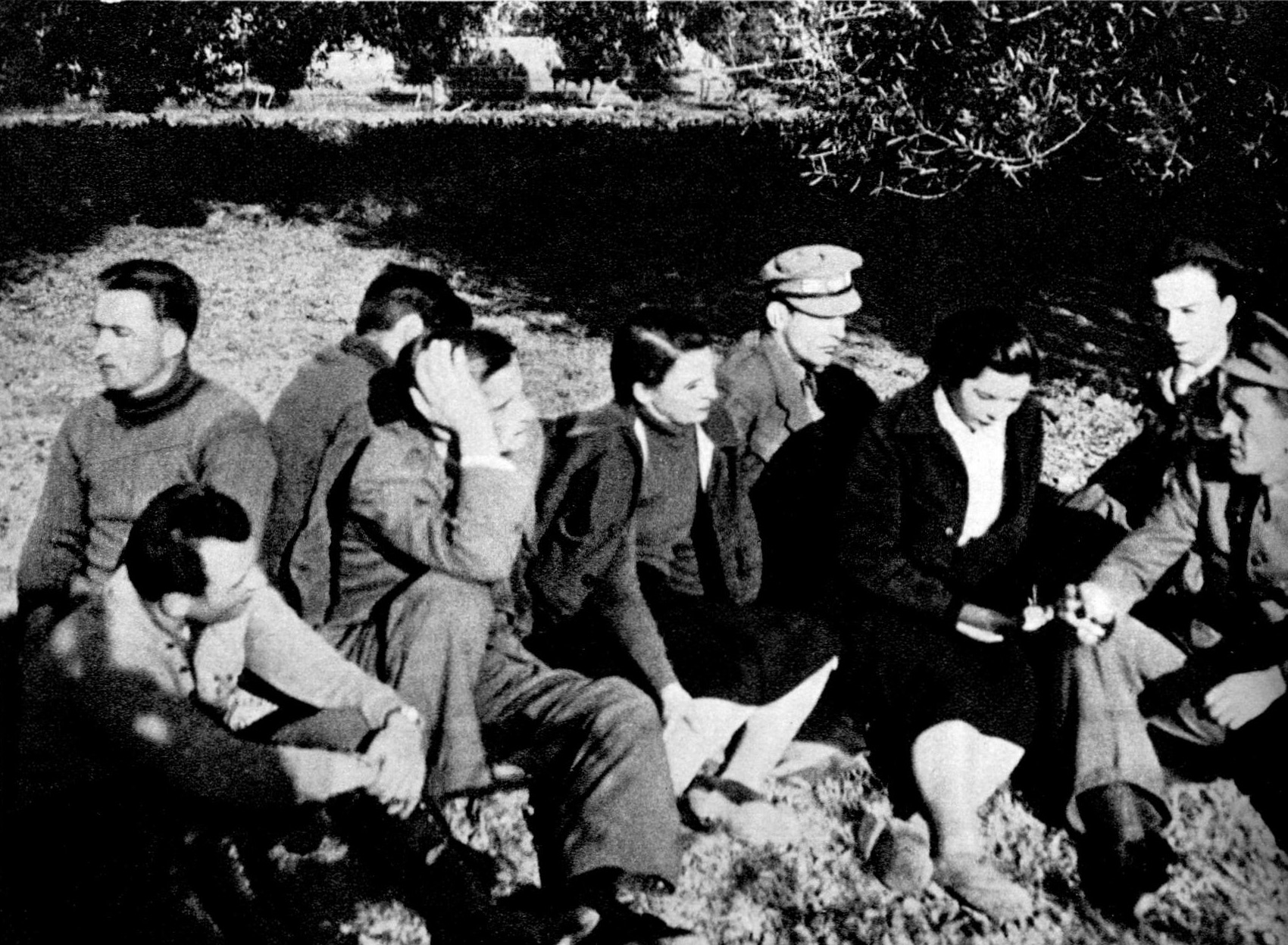 Srpskohrvatski / српскохрватски: Jugoslovenski interbrigadisti na sastanku s predstavnikom KPJ Božidarom Maslarićem u oktobru-decembu 1937. godine